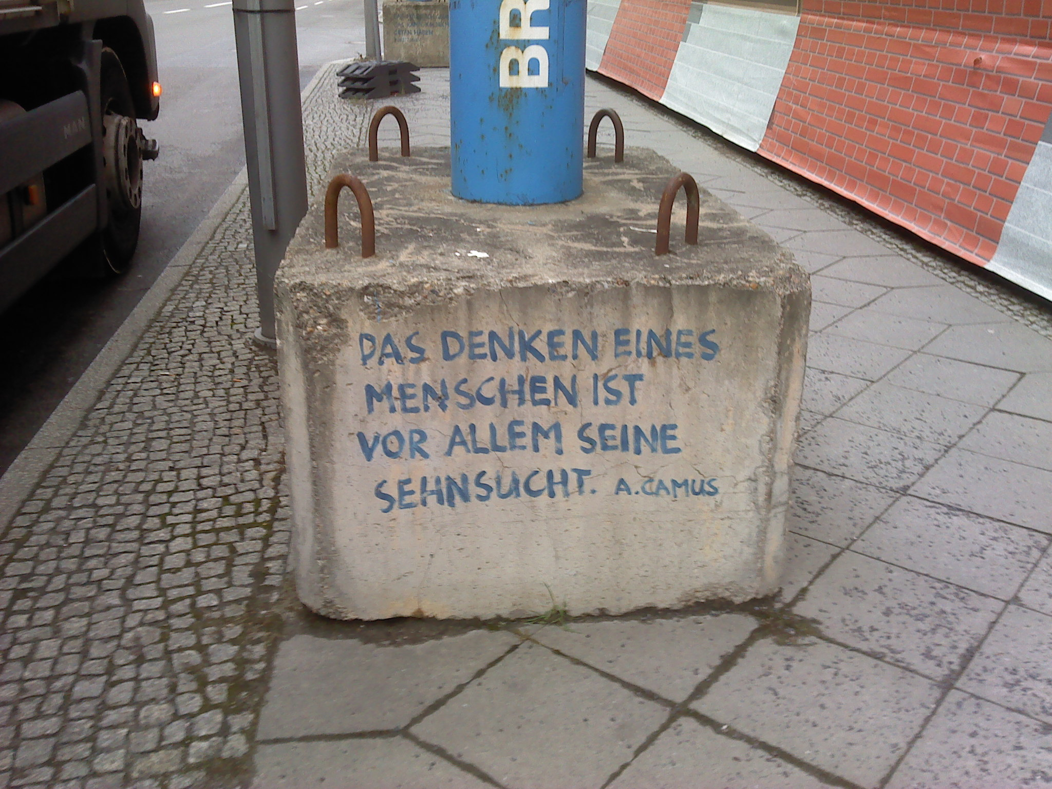 Berlin-Mitte. Französische Straße, Straßenkunst von Wolfgang Nieblich